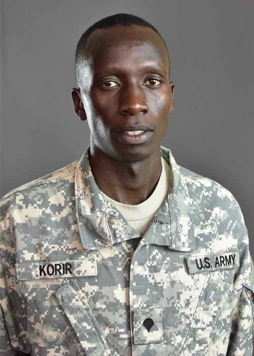 SPC KORIR